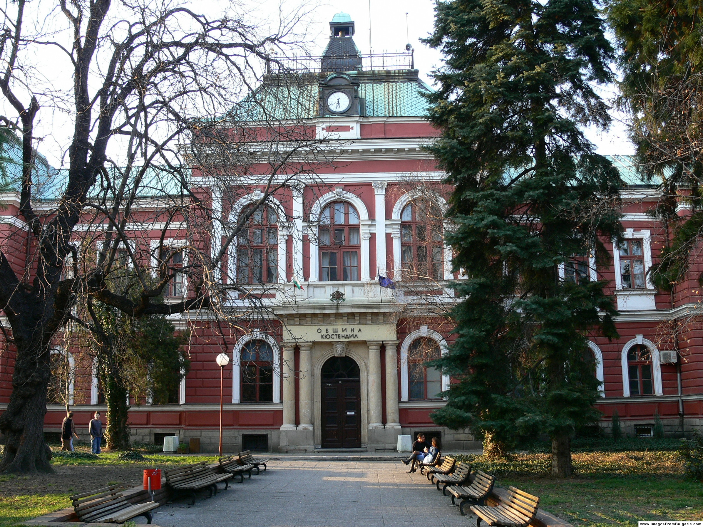 Kyustendil, Bulgaria: Town Hall, arch. Friedrich Grünanger